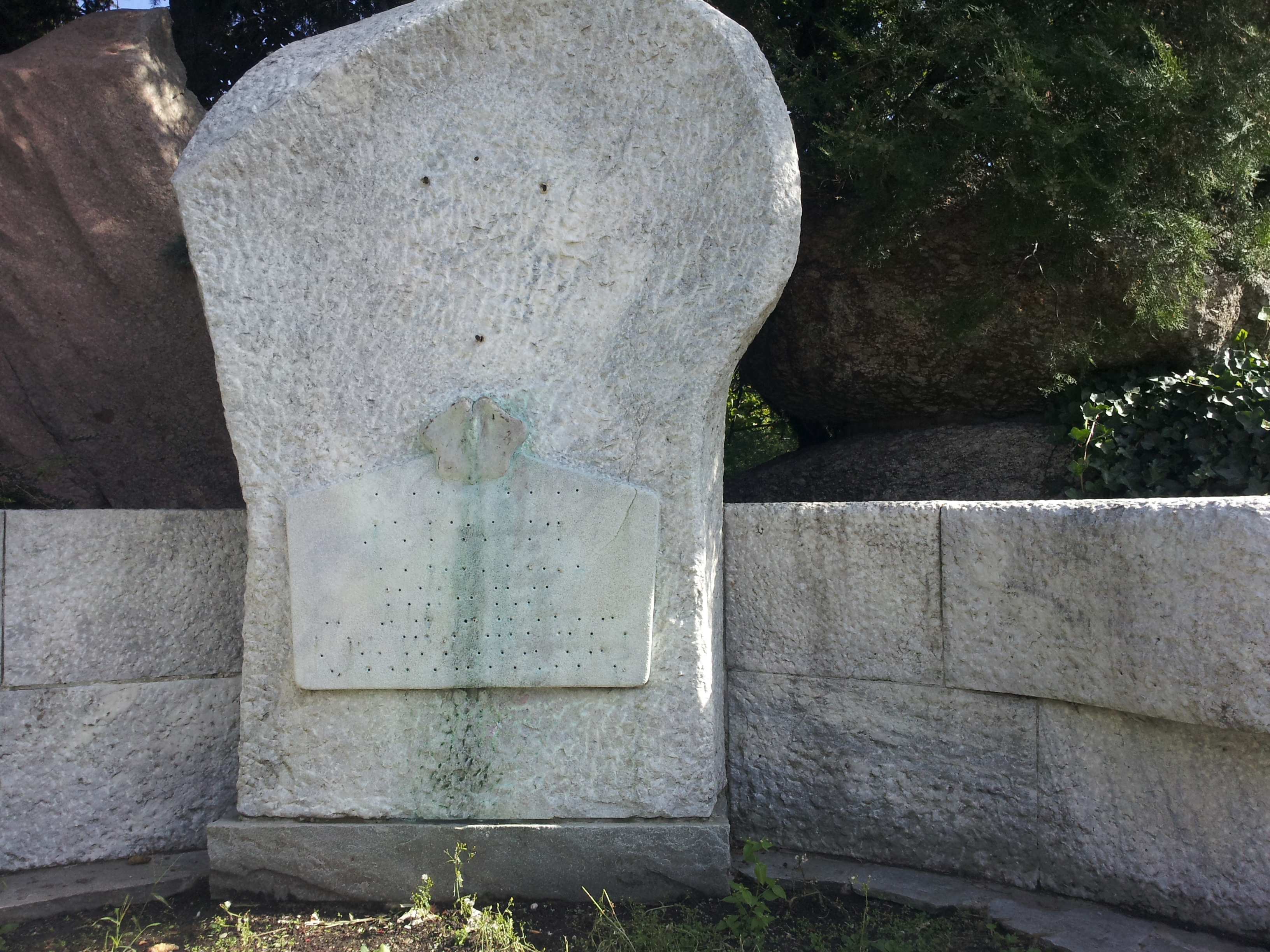 Denkmal für Rudolf Steiner im September 2014. Alle Teile aus Bronze sind abmontiert.